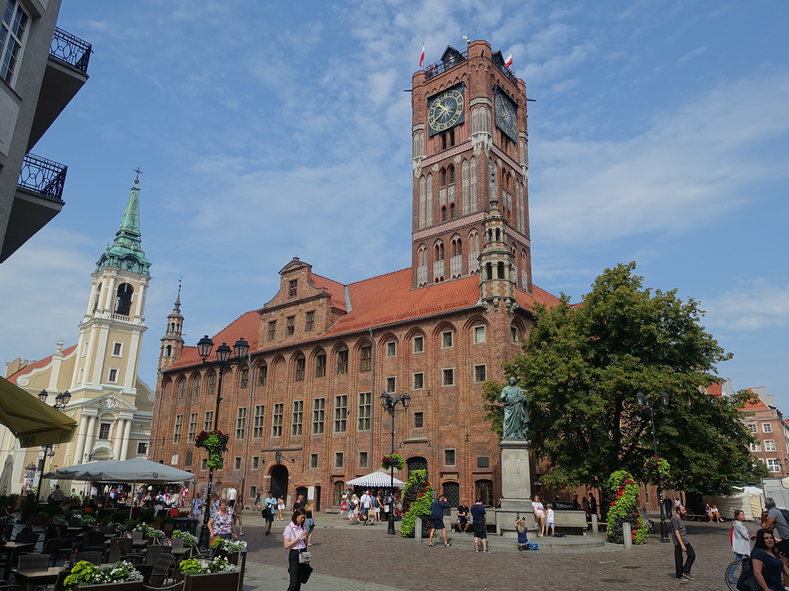 Thorner Rathaus mit Kopernikus-Denkmal an der Südostecke